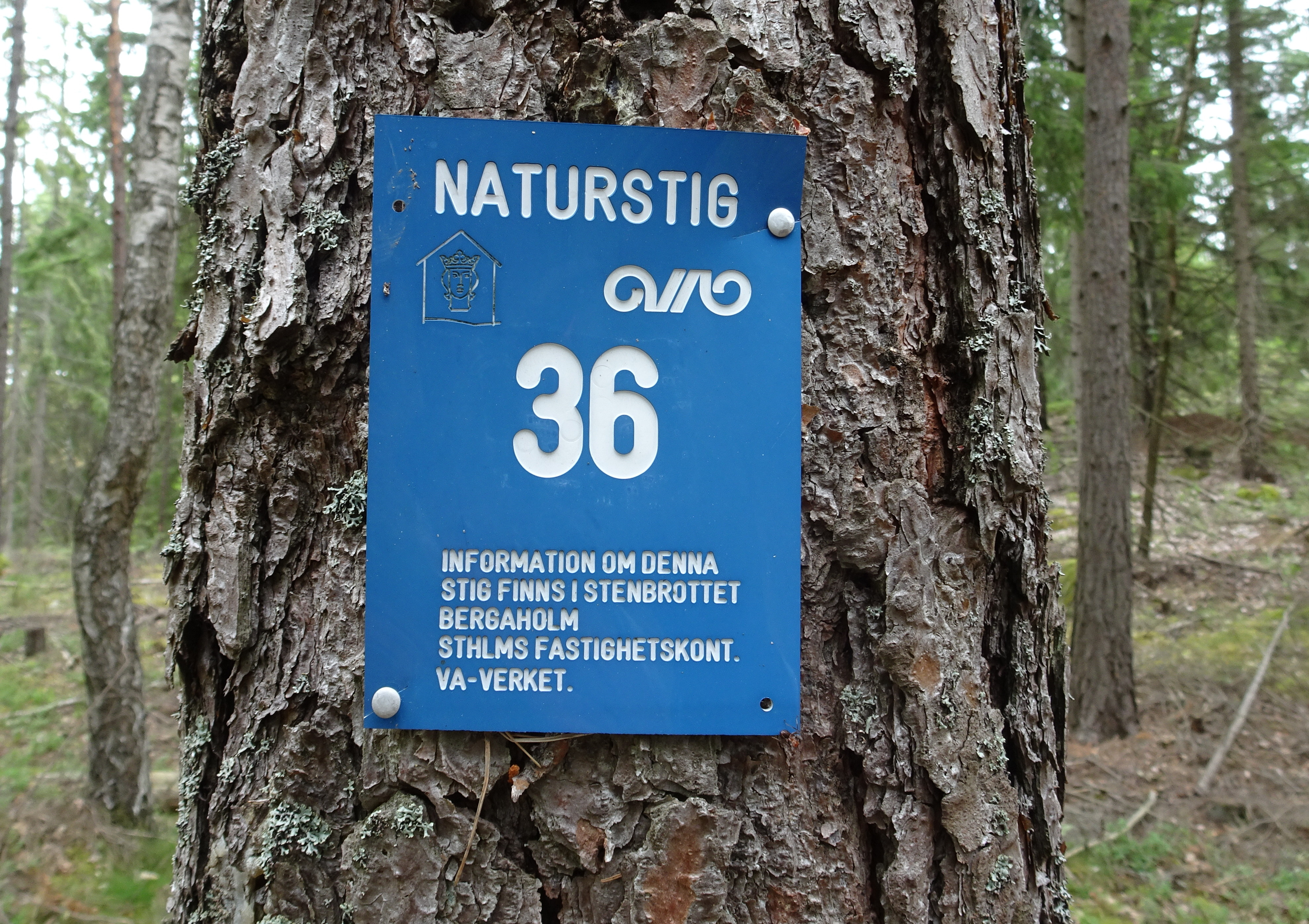 Bornsjöns naturstig infopunkt 5